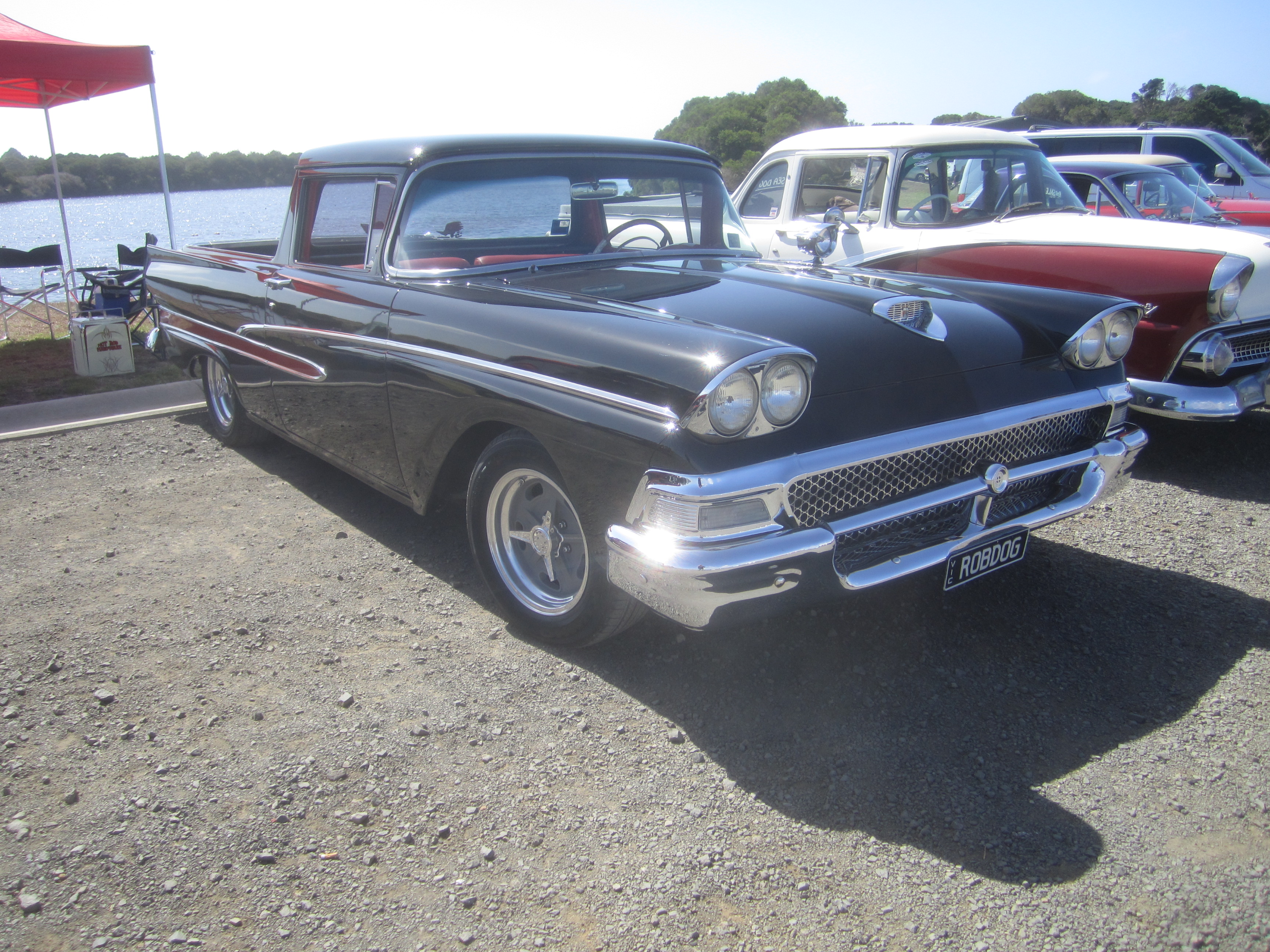 Ford Ranchero 1958 модельного года